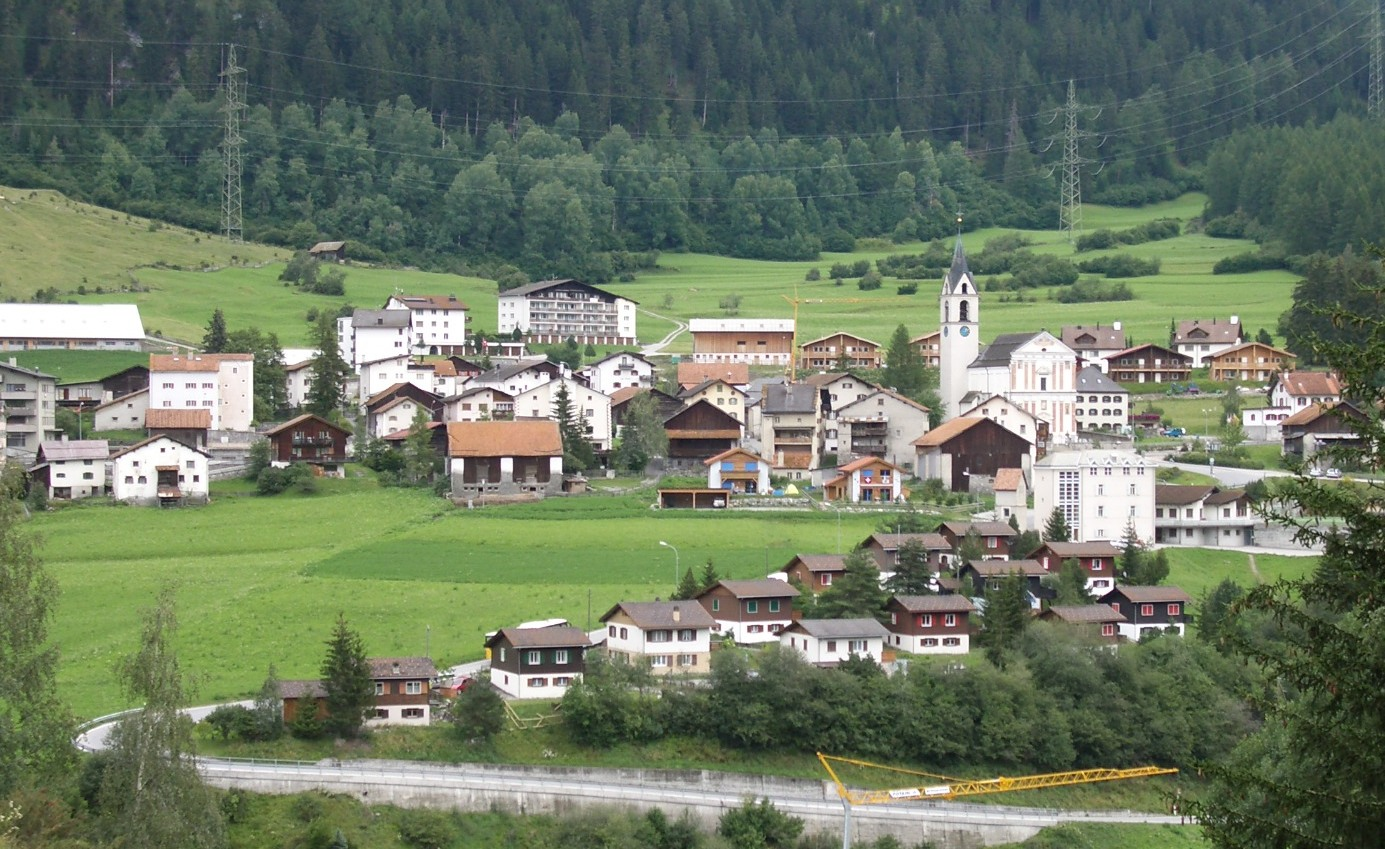 Cunter GR, Switzerland